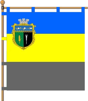 Прапор Тернівки